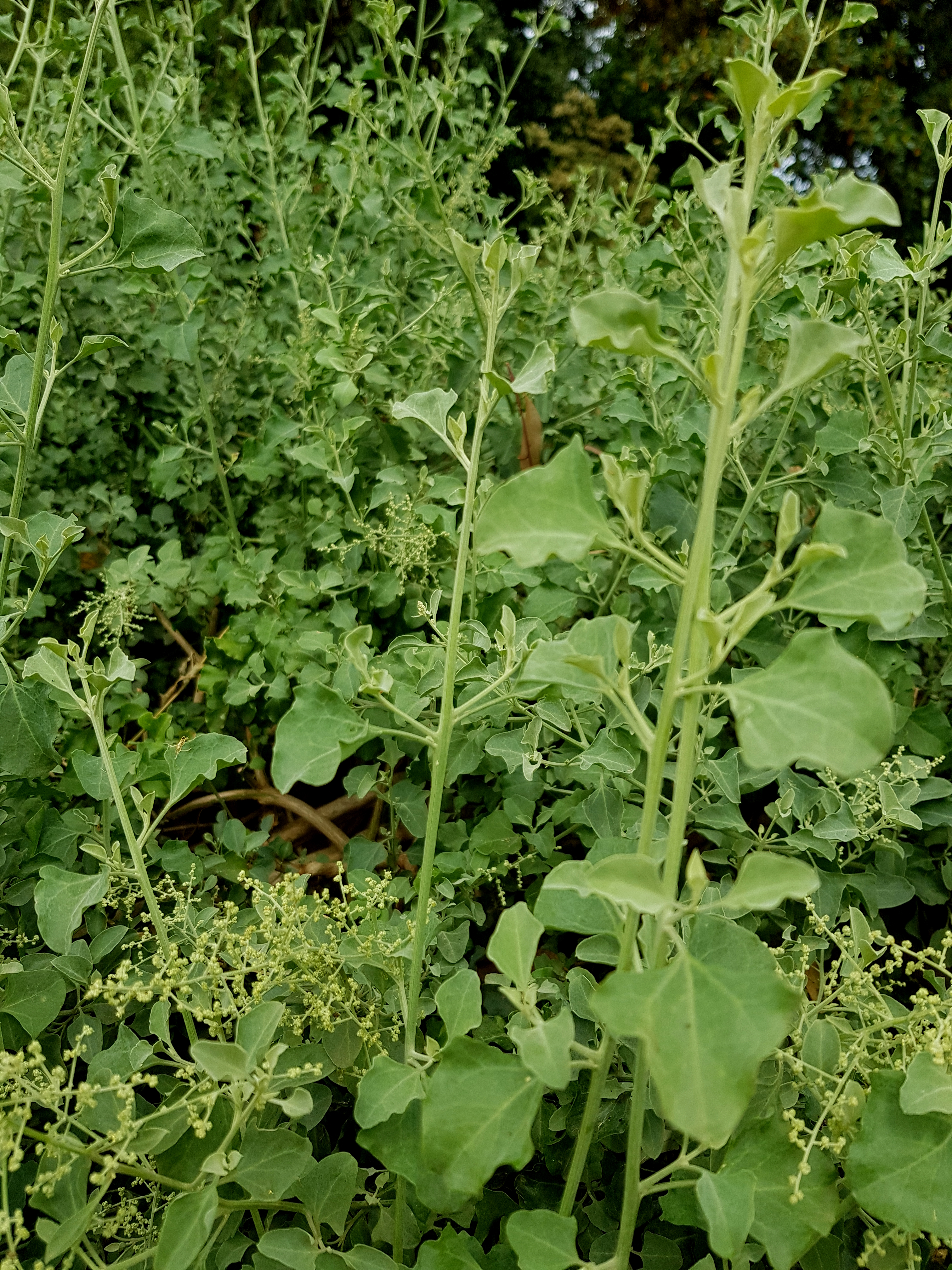 Chenopodium parabolicum